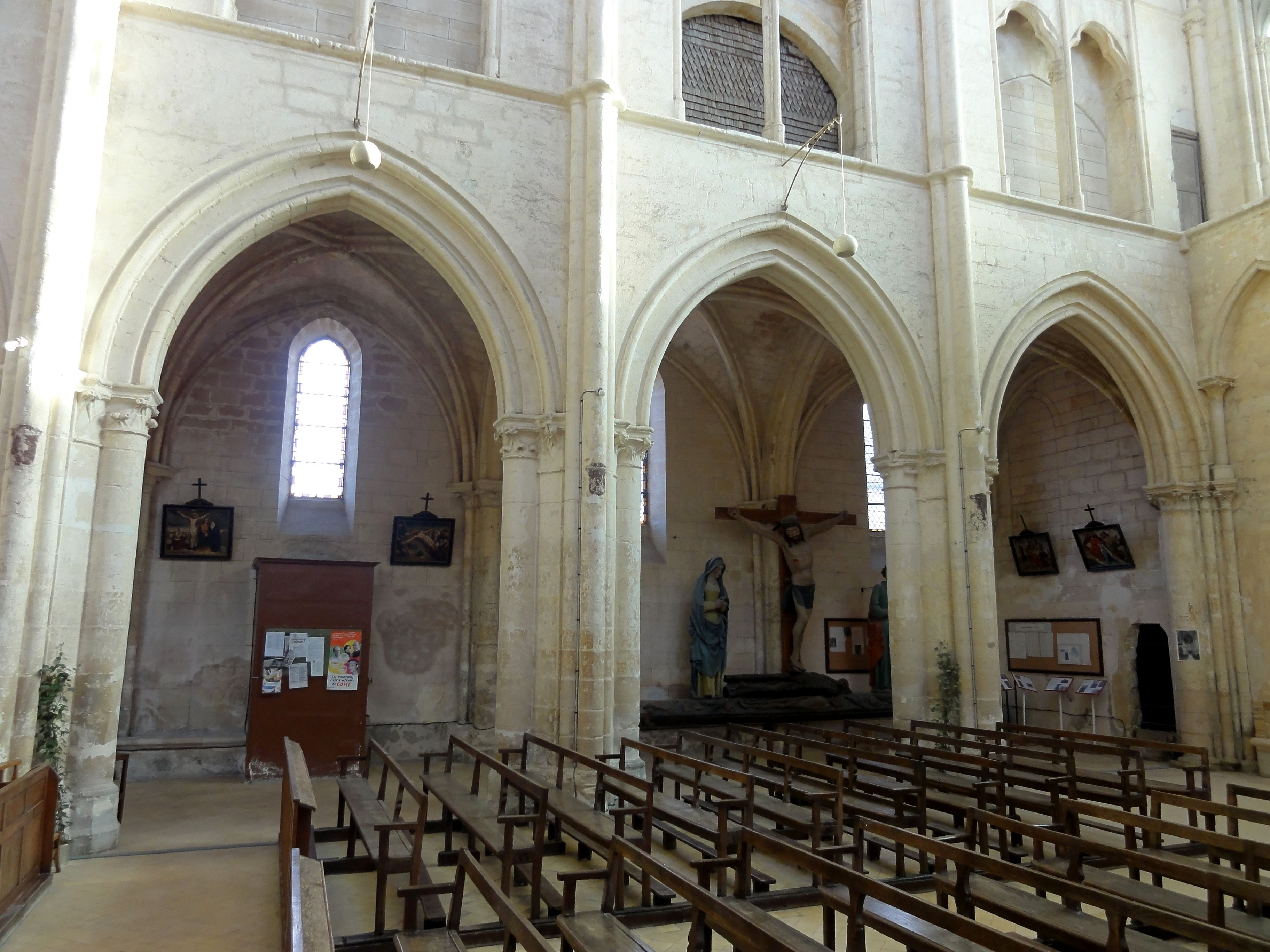 Grandes arcades du nord.